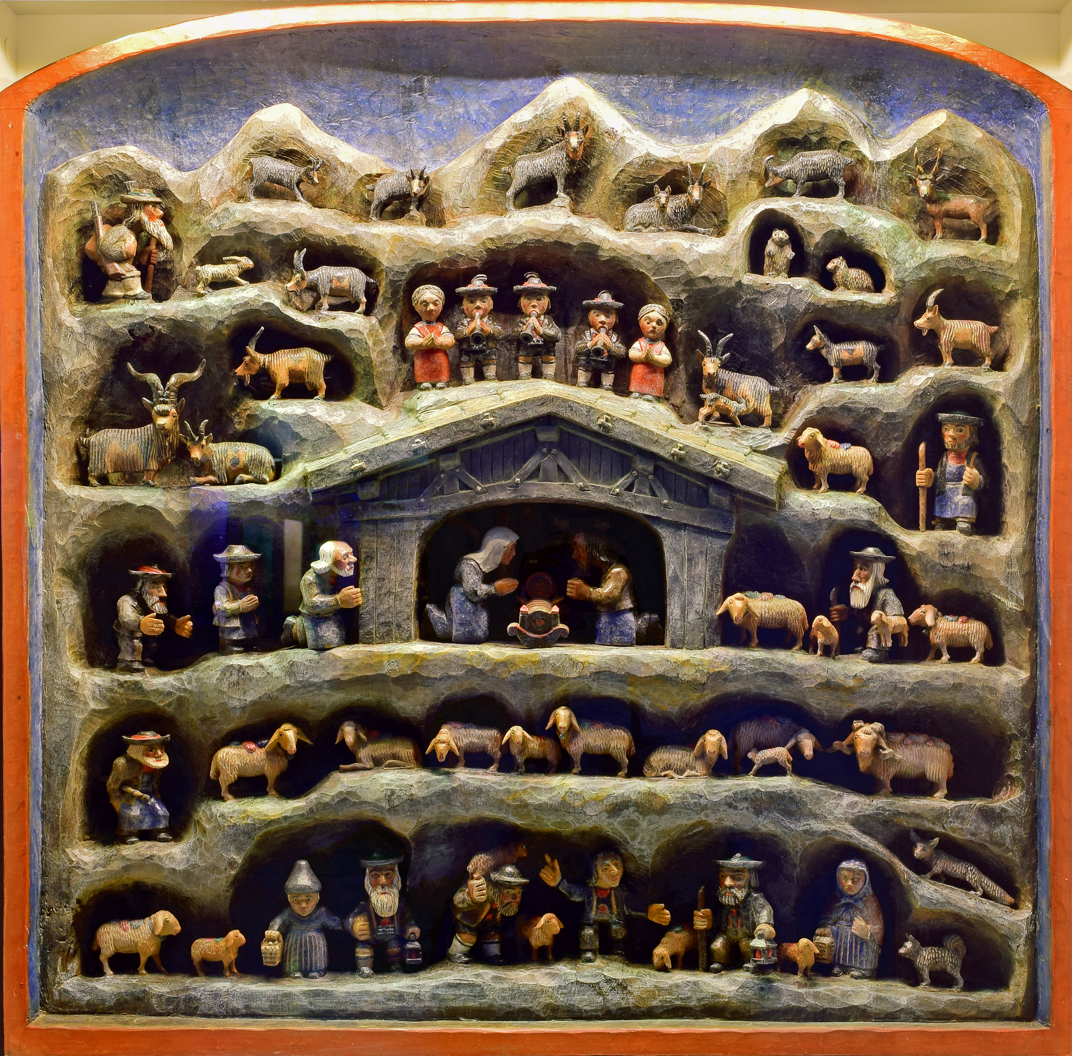 Teil der Krippensammlung im Tiroler Volkskunstmuseum in Innsbruck. Die Gurschler-Krippe wurde 1987 in Partschins von Friedrich Gurschler aus Zirbenholz geschnitzt.